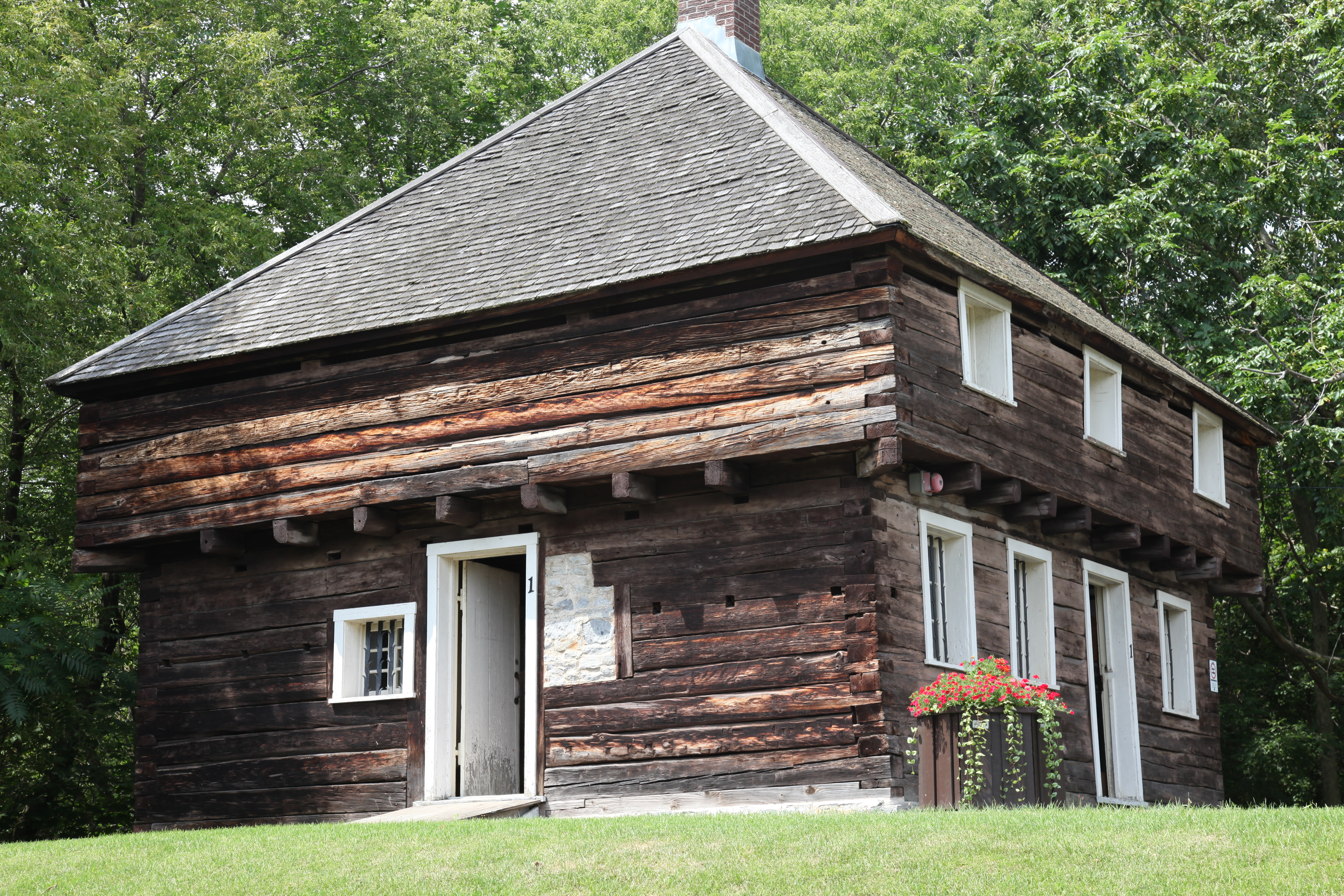 Le blockhaus de la Rivière-Lacolle, classé en 1960, est un ouvrage militaire, érigé à une date indéterminée entre 1778 et 1812. L'édifice en bois de plan carré à deux étages, dont l'étage supérieur est en encorbellement, est coiffé d'un toit en pavillon. La désignation s'applique aussi au terrain. Le blockhaus de la Rivière-Lacolle se situe sur un vaste terrain paysager surplombant la rivière Lacolle, dans la municipalité de Saint-Paul-de-l'Île-aux-Noix. La valeur patrimoniale du blockhaus repose sur son intérêt pour l'architecture militaire. Il est un petit ouvrage défensif qui sert notamment d'avant-poste à un fort, de point de contrôle pour un accès stratégique, de halte et d'abri des détachements en mouvement, d'entrepôt de vivres et de munitions ainsi que de caserne pour de petites garnisons. Il est bâti sur le modèle des fortins, à partir de matériaux locaux comme bois et pierre, et requiert peu de connaissances en matière de construction. Le blockhaus de la Rivière-Lacolle est représentatif de ce type d'ouvrage. La valeur patrimoniale du blockhaus de la Rivière-Lacolle repose également sur sa rareté. Après la signature du traité de Gand par les Britanniques et les Américains en 1814, les ouvrages militaires sont progressivement abandonnés, affectés à d'autres fonctions ou détruits. Parmi les 25 blockhaus construits au Québec, celui de la Rivière-Lacolle est le seul qui subsistent jusqu'à nos jours.